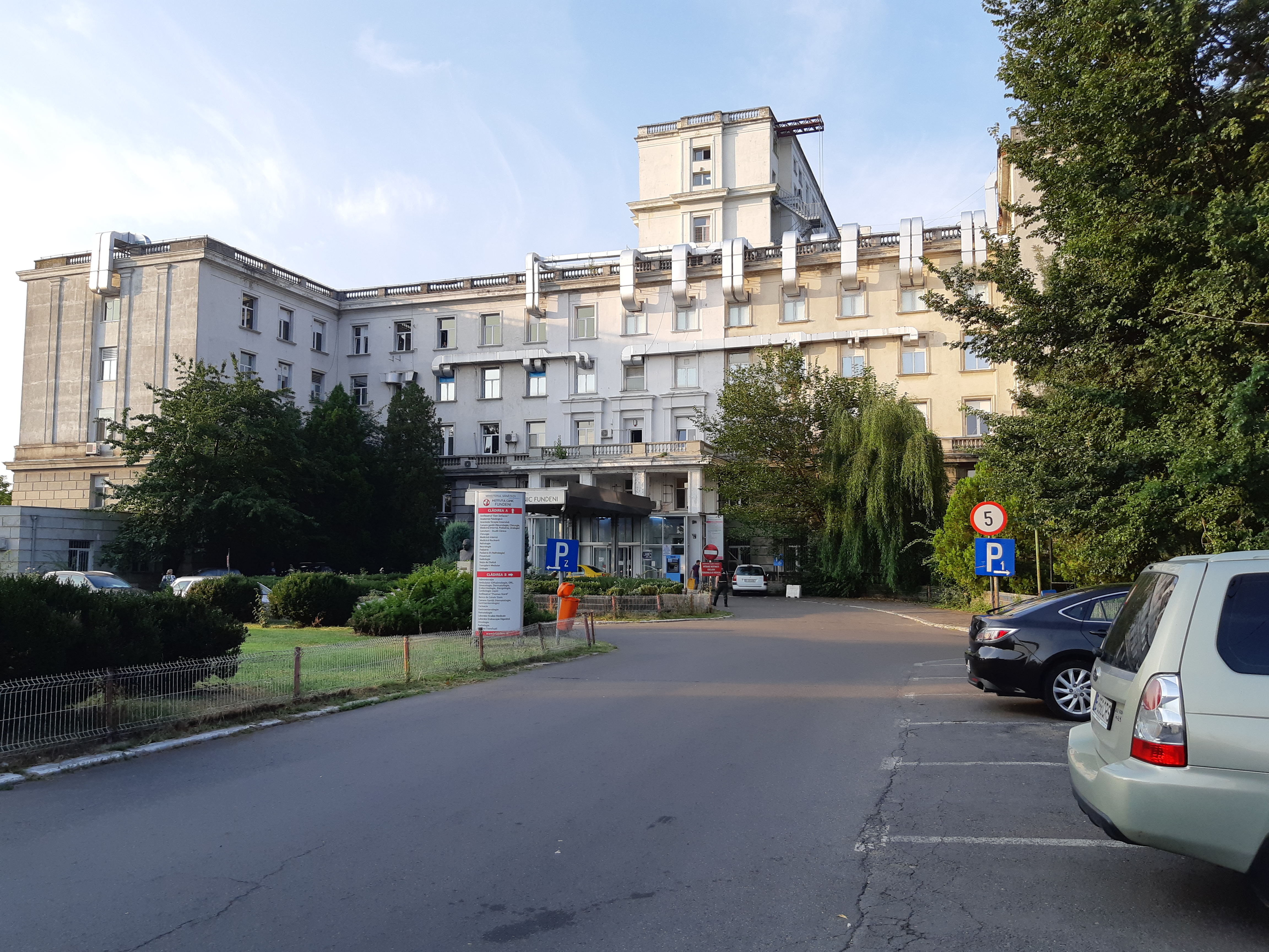 Institutul Clinic Fundeni - pavilionul A